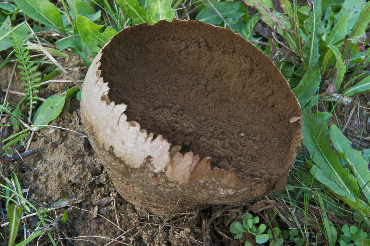 Зрела пухара